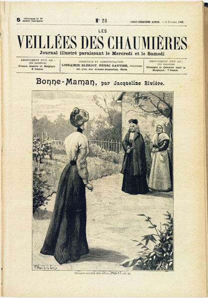 Couverture revue les veillées des chaumières du 3 février 1902